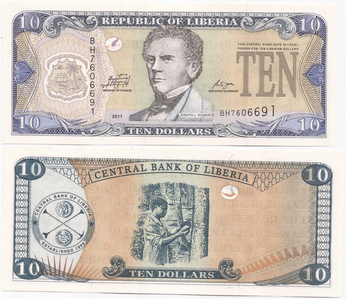 Billete 10 Dólares, Liberia.